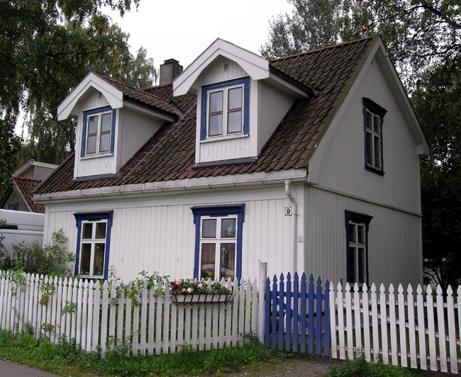 Odalsgata 9, Oslo. Oldest part log house from ca. 1860; enlarged 1923.